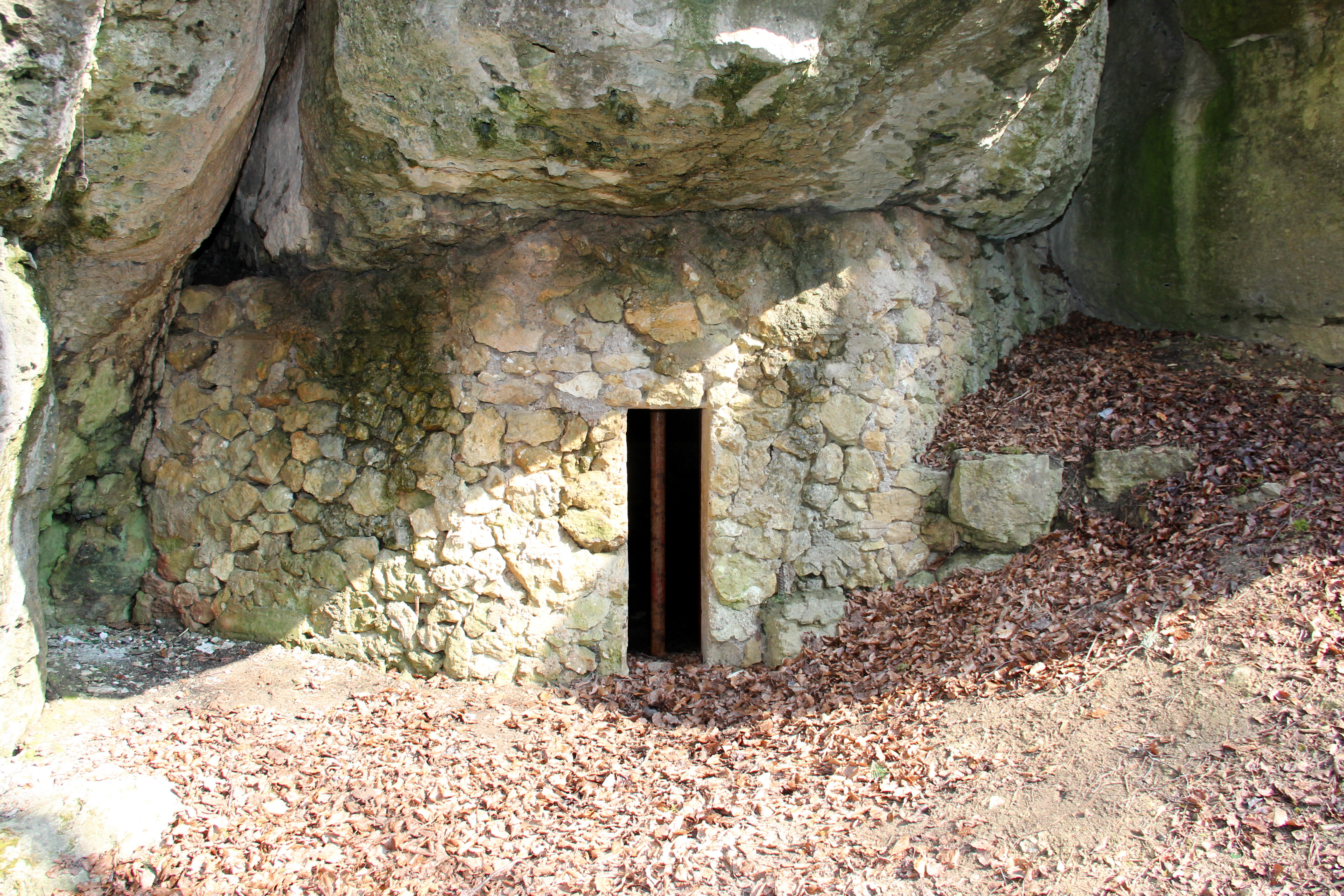 Distlergrotte, Eingang